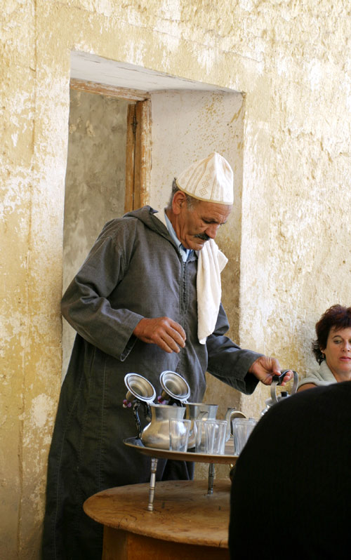 Beduine schenkt Tee ein, Marokko